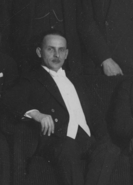 Zygmunt Vetulani - Zjazd absolwentów Akademii Eksportowej w Wiedniu